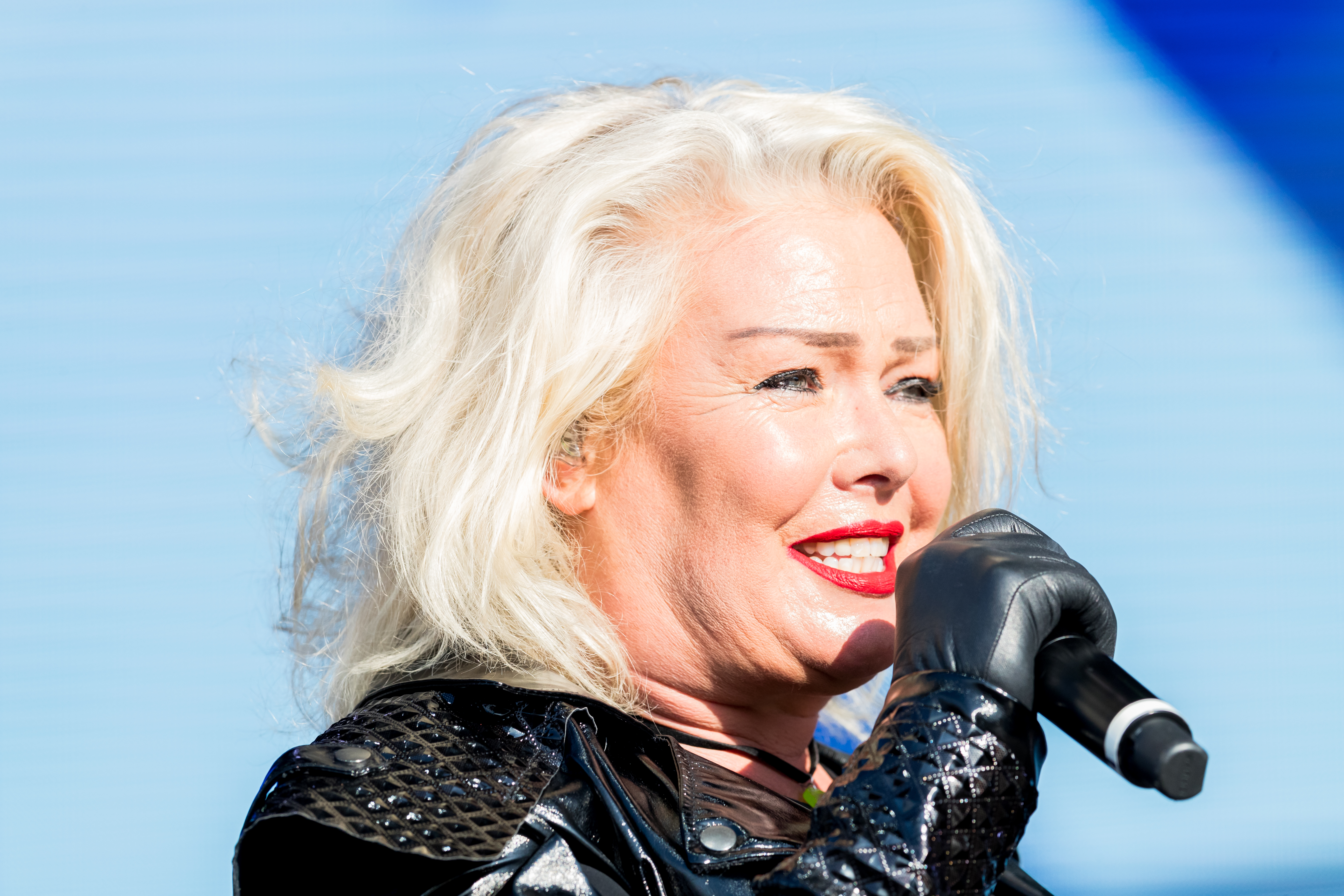 Kim Wilde during Werner Rennen at Flugplatz Hartenholm, Hasenmoor, Schleswig-Holstein, Germany on 2019-08-30, Photo: Sven Mandel